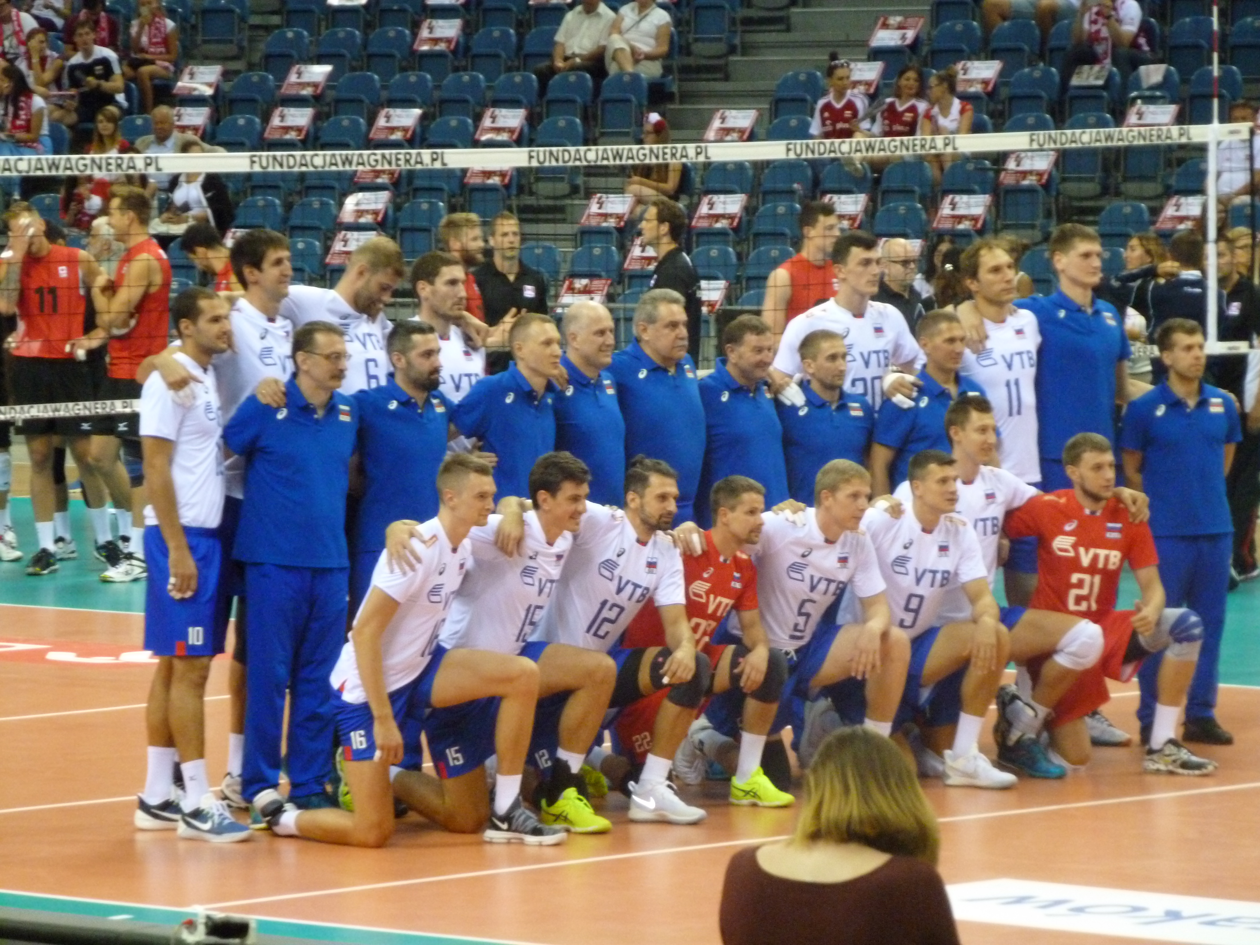 Zdjęcie zrobione podczas Memoriału Huberta Jerzego Wagnera 2017